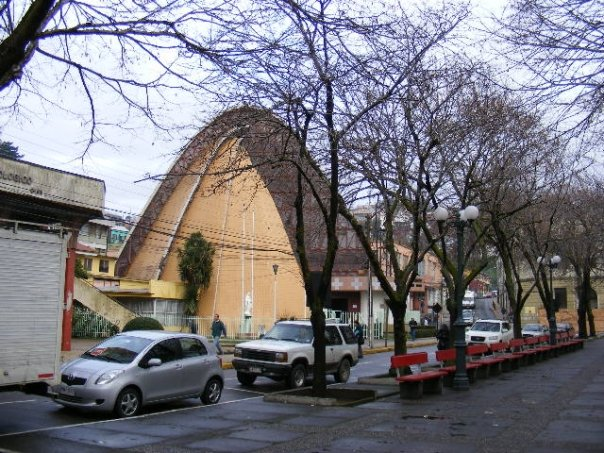 Iglesia de talcahuano